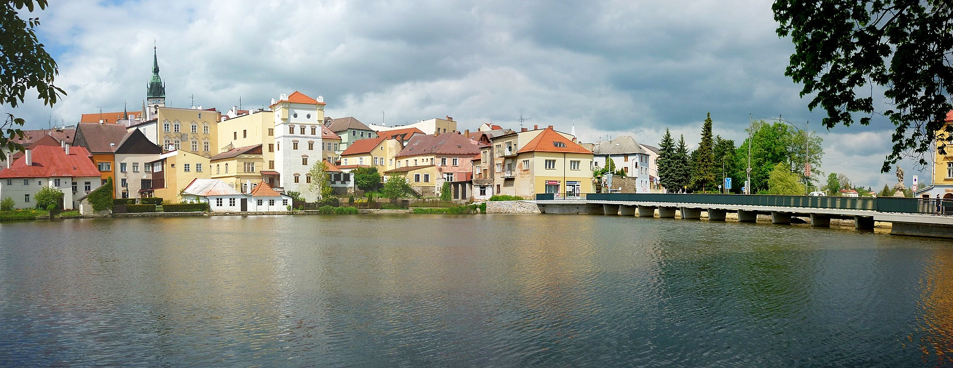 Rybník Malý Vajgar v J. Hradci